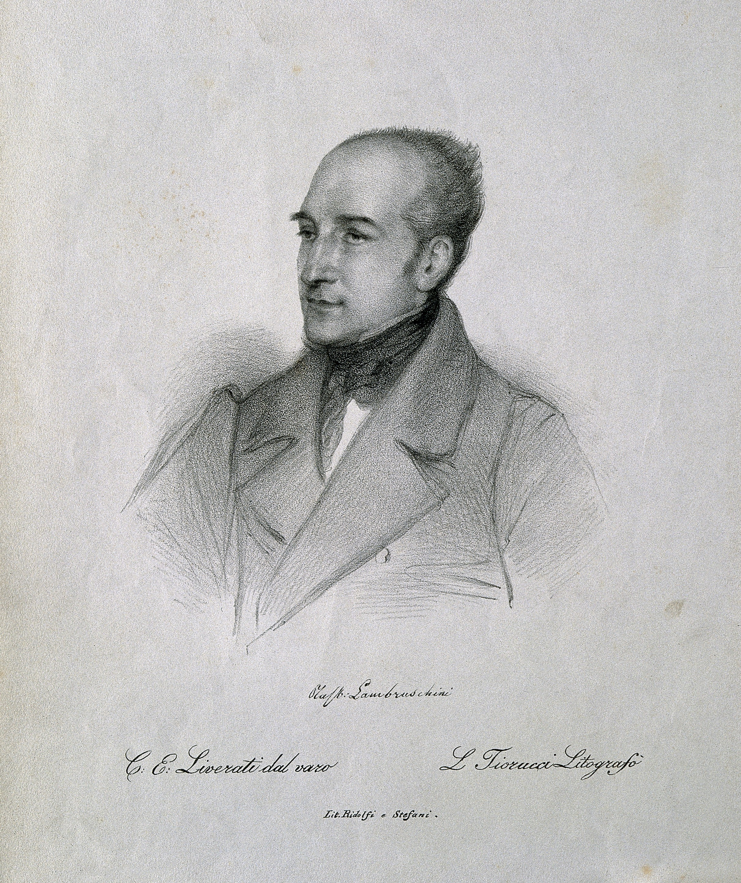 Genre/Technique: Portrait prints. Lithographs. Subject name: Lambruschini, Raffaello, 1788-1873.